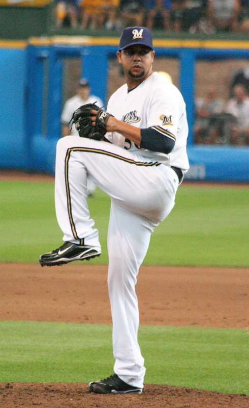 Claudio Vargas